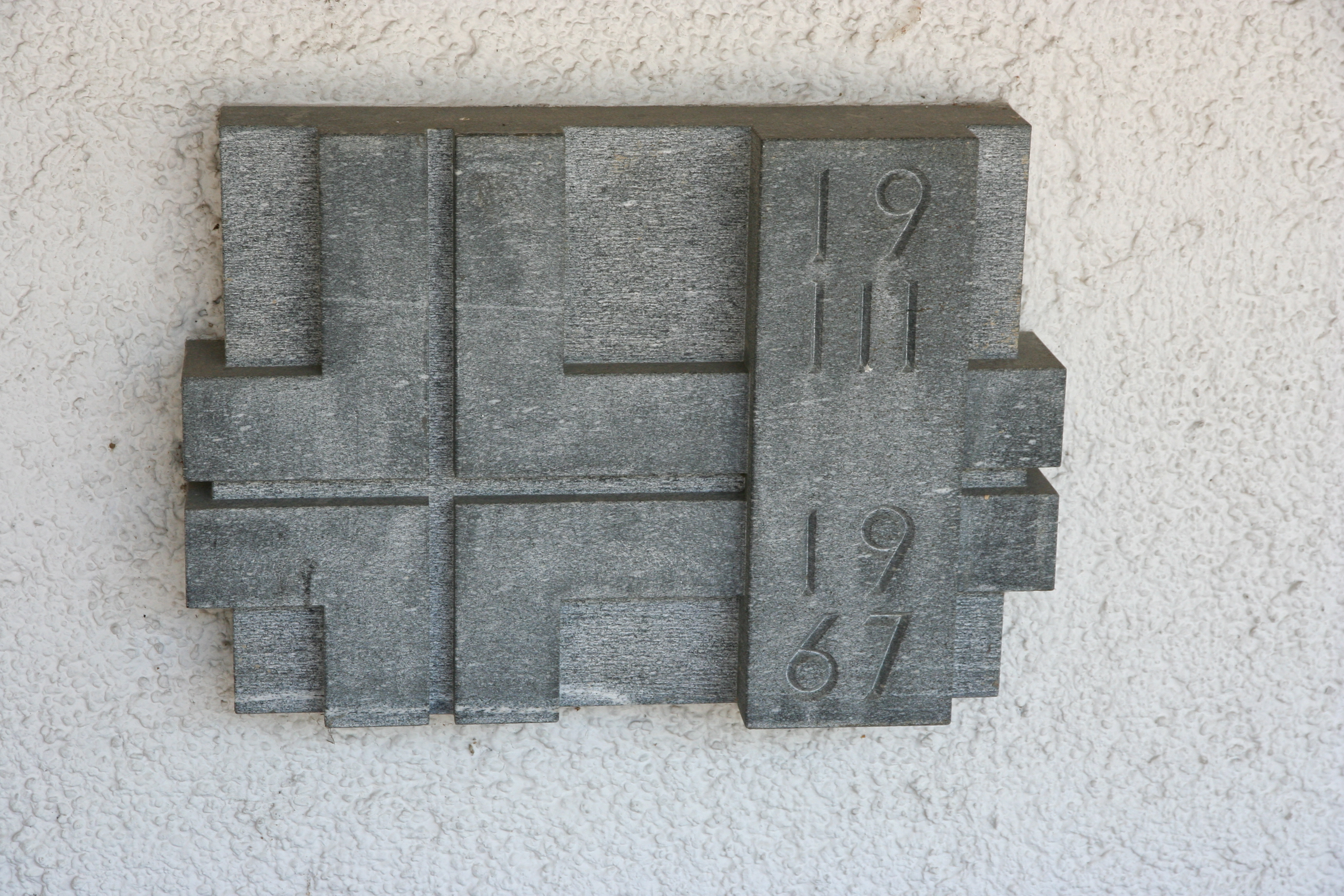 Römisch-katholische Pfarrkirche St. Josef Dietikon, Grundstein